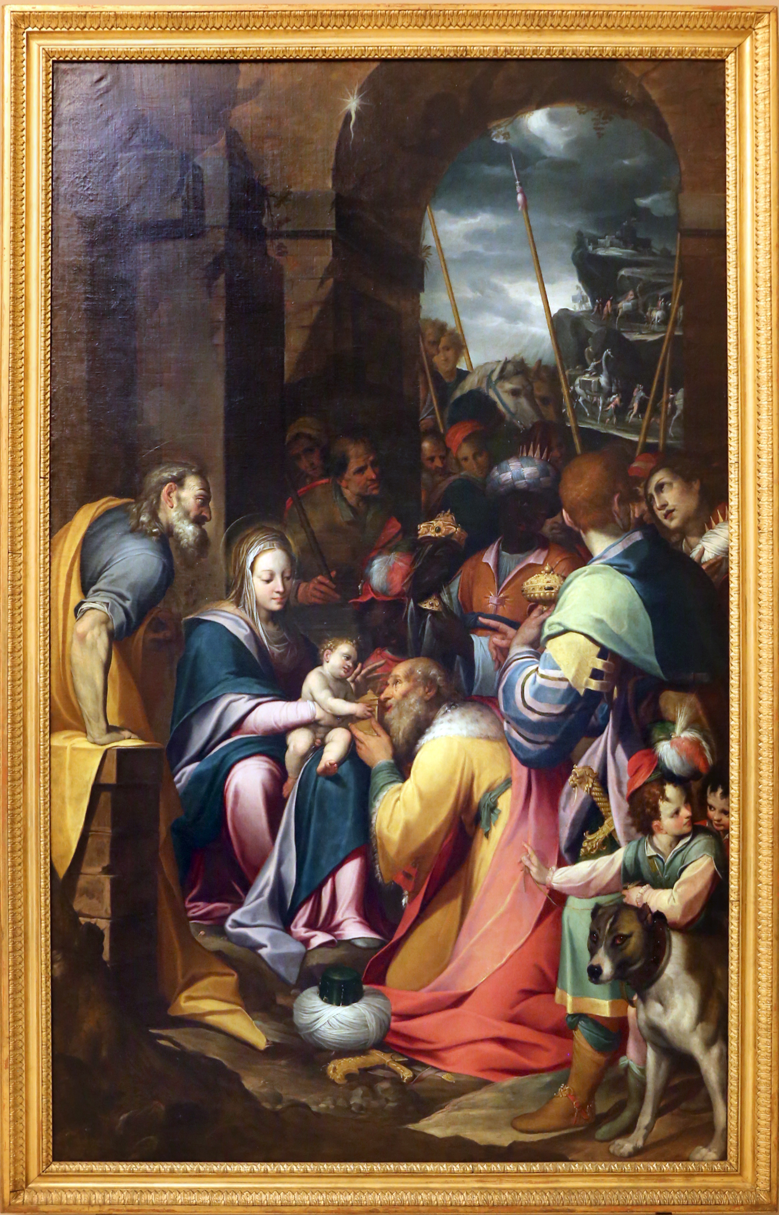 Palazzo dei Musei (Modena) This is a photo of a monument which is part of cultural heritage of Italy.